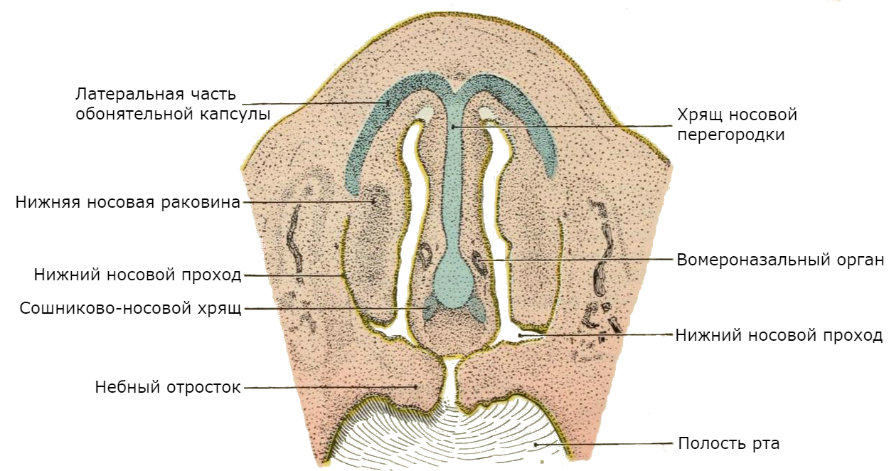 Фронтальное сечение назальной полости человеческого эмбриона. Вомероназальный орган отмечен справа.